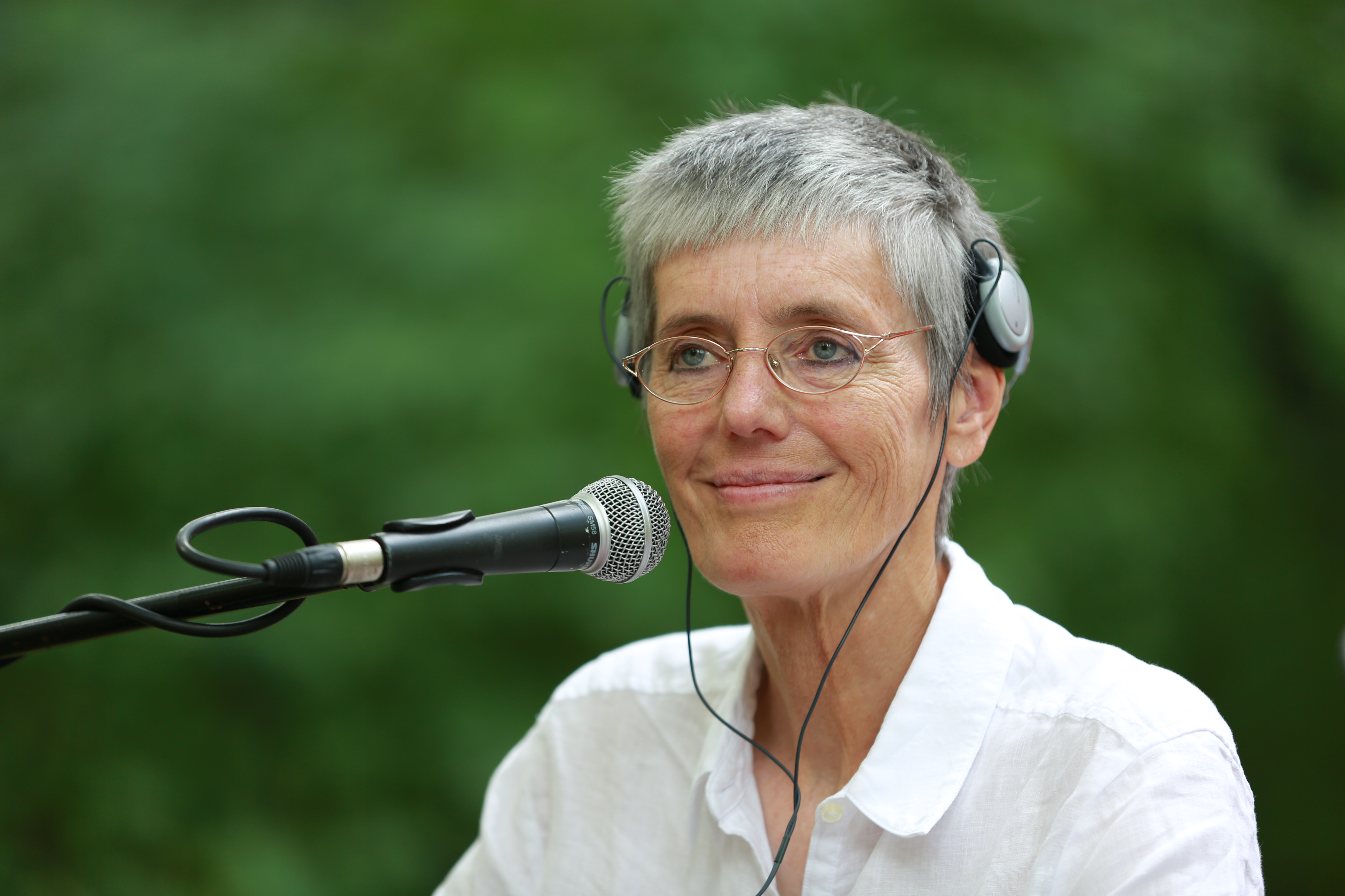 Die Schriftstellerin Petra Morsbach auf dem Erlanger Poetenfest 2017